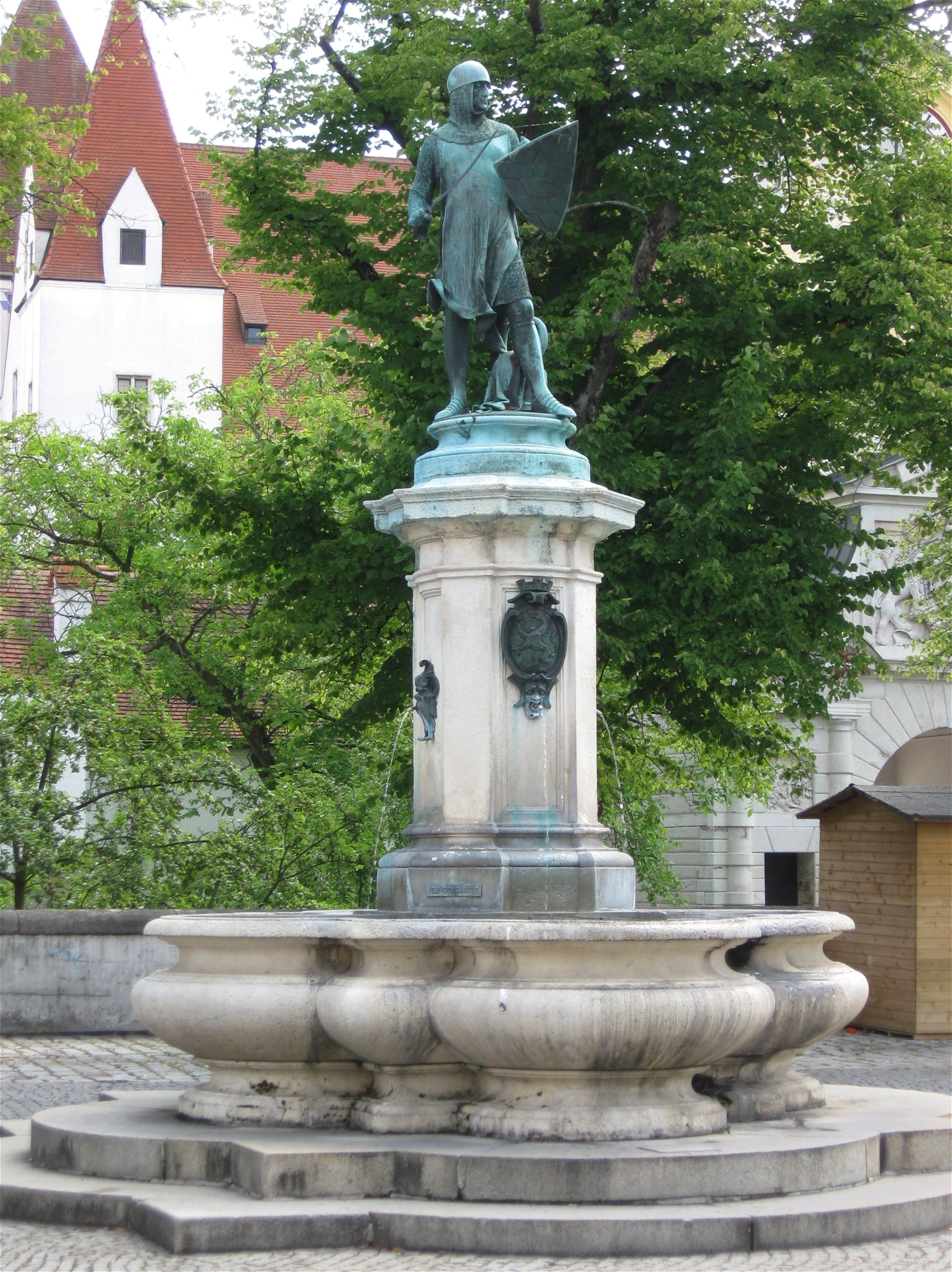 Paradeplatz; Laufbrunnen, neubarocke Anlage mit vierpaßförmiger Brunnenschale und Stele mit Bronzefigur Kaiser Ludwigs des Bayern, von Michael Wagmüller, 1881. D-1-61-000-363